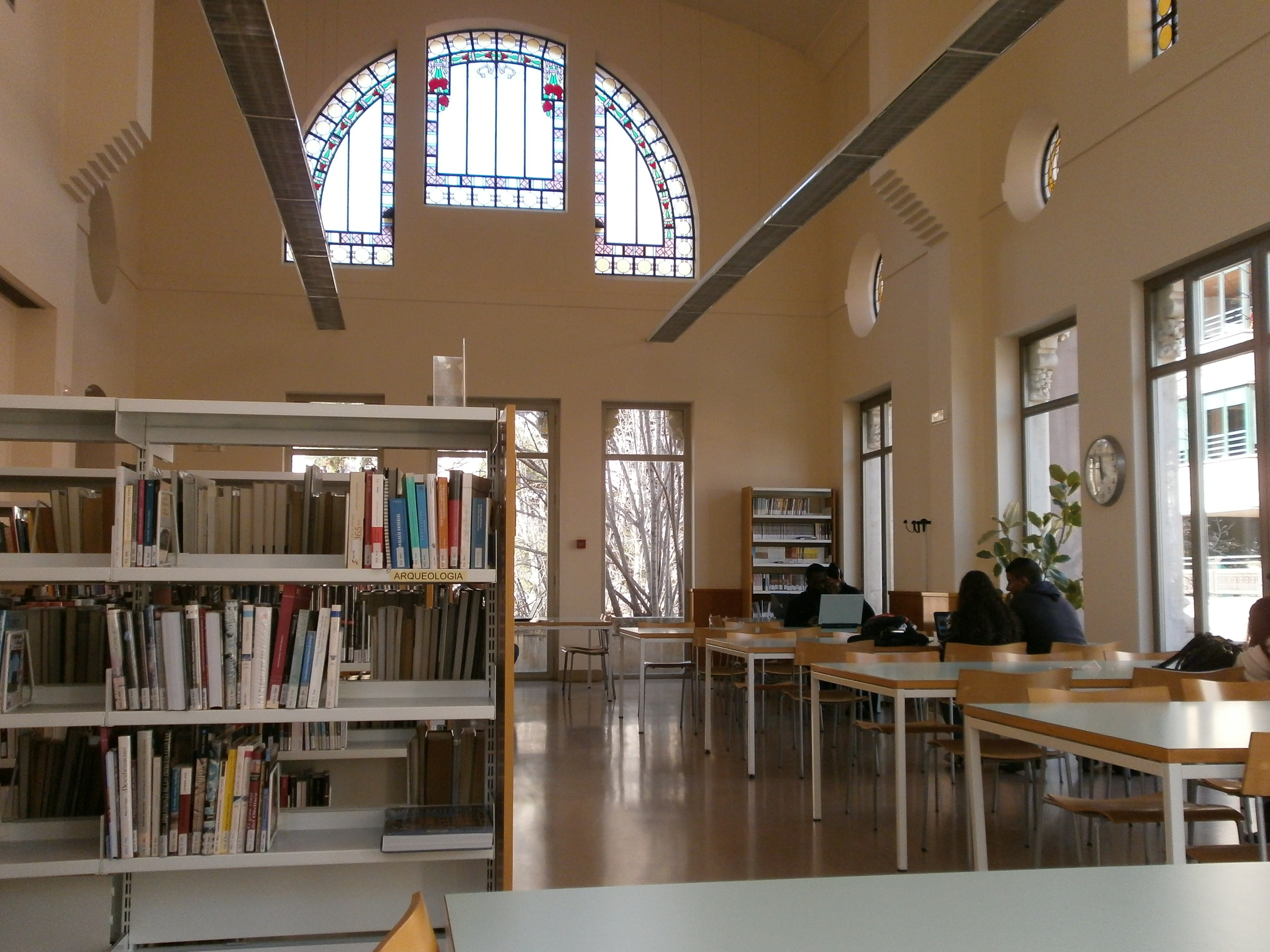 Sala historia de la Biblioteca del Casino